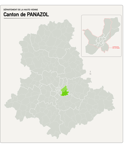 Carte du nouveau canton de Panazol.